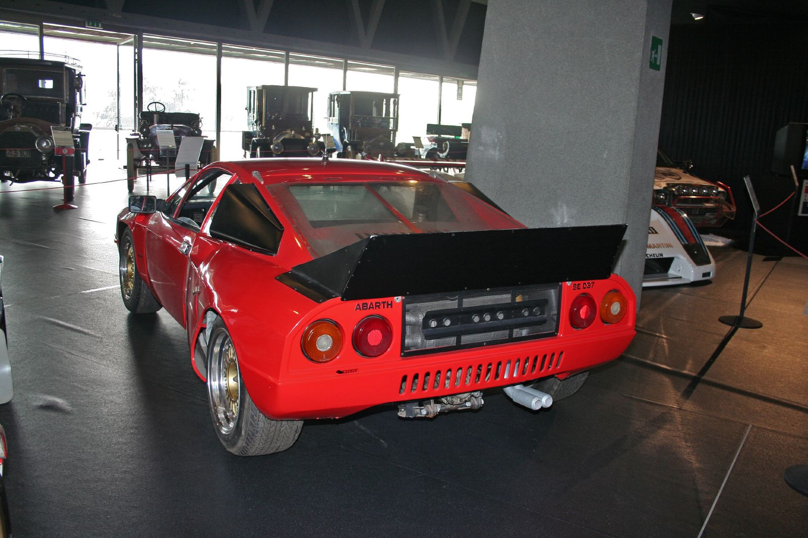 Lancia Abarth SE 037 prototipo del 1980